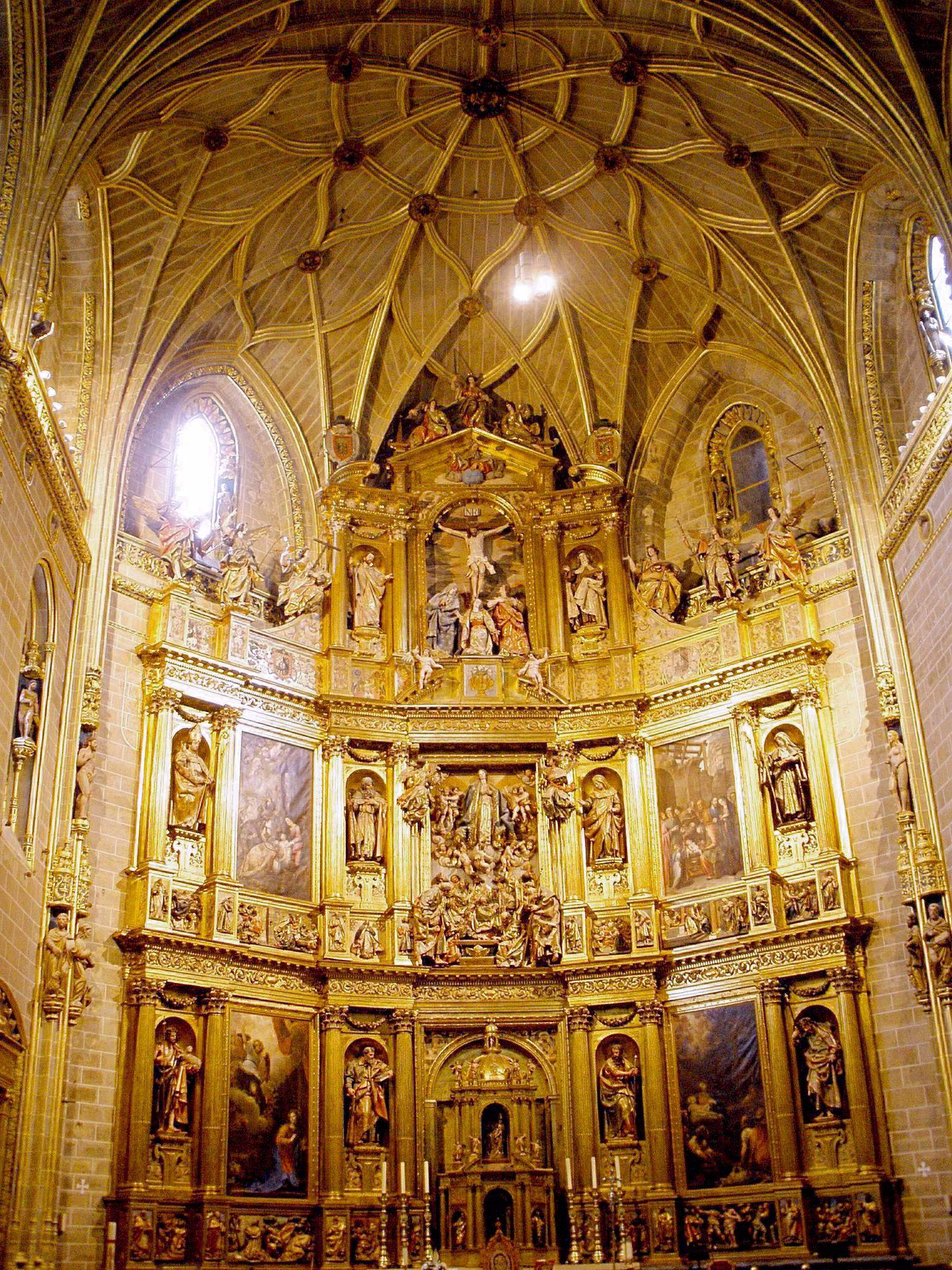 Retablo mayor de la Catedral de Plasencia (Cáceres)